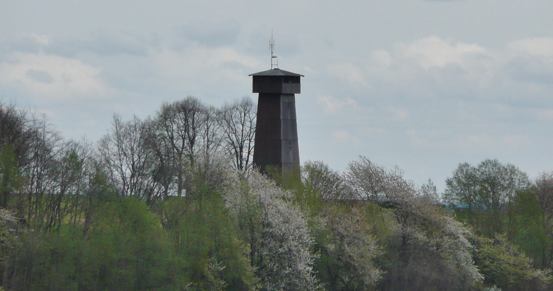 Juxkopfturm bei Spiegelberg im Schwäbisch-Fränkischen Wald, 1932 errichtet